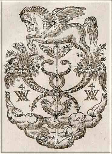 Übersetzung der lateinischen Bibel der Protestanten aus dem Hebräischen